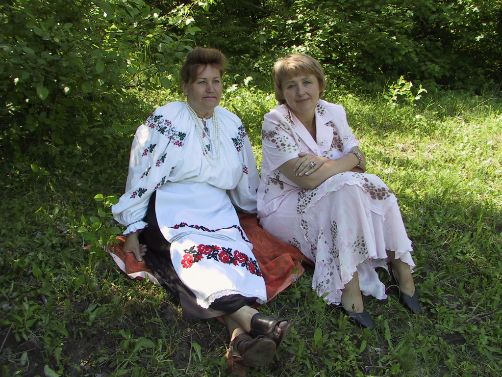 Директор школи Білозерська Л. М. та Президент Міжнародного освітнього фонду ім. Я. Мудрого Стрілько В. В. на Святі МАНМ